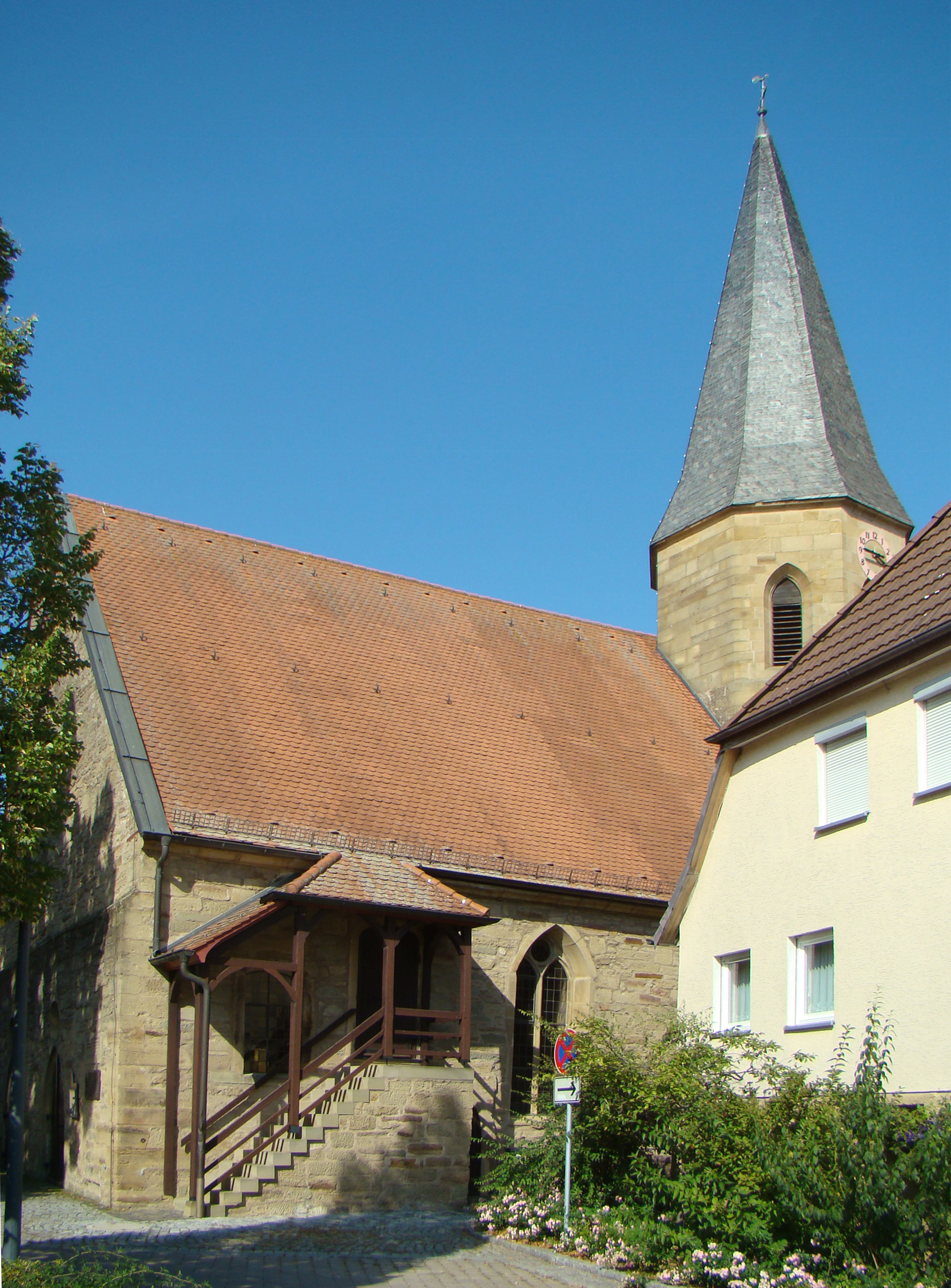 Maria-Magdalenen-Kirche in Brackenheim-Dürrenzimmern, vgl. Fekete: Kunst- und Kulturdenkmale in Stadt- und Landkreis Heilbronn (1991, S. 126/127)